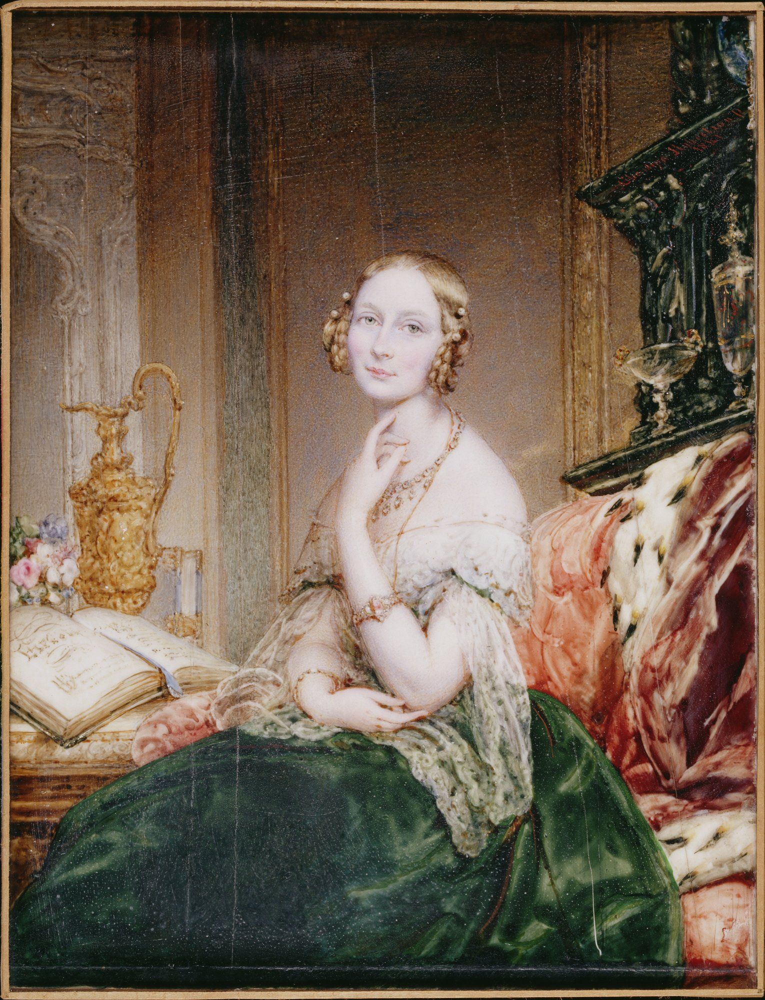 Великая княгиня Елена Павловна (1807-1873) Portrait of Grand Duchess Elena Pavlovna Christina Robertson was a British portrait and miniature painter. Born Christina Saunders in Kinghorn, Fife, Scotland, Robertson learned to paint miniatures from her uncle, George Saunders, a miniaturist based in London. Robertson developed a successful portrait career and often traveled abroad in search of new clients. From 1839-1841, Robertson lived and worked in St. Petersburg, Russia. After spending eight years in her London studio, Robertson returned to Russia in 1849 to work as a portraitist for the imperial family. The sitter in this portrait may be a member of the Russian artistocracy, but no positive identification has been made. Portrait of Grand Duchess Elena Pavlovna, almost full length seated on a red sofa. Her golden hair is dressed with braids on either side. Her blue dress is low cut and trimmed with lace. She wears necklaces and bracelets. At left is a table with a red marble top, a vase of flowers, an open book and a golden vase in the 17th century style. Over back of sofa is a reddish cloak lined with ermine. Behind the sofa is an elaborately carved ebony sofa with two Renaissance rock crystal vases. Bronze frame is comtemporary to the painting.